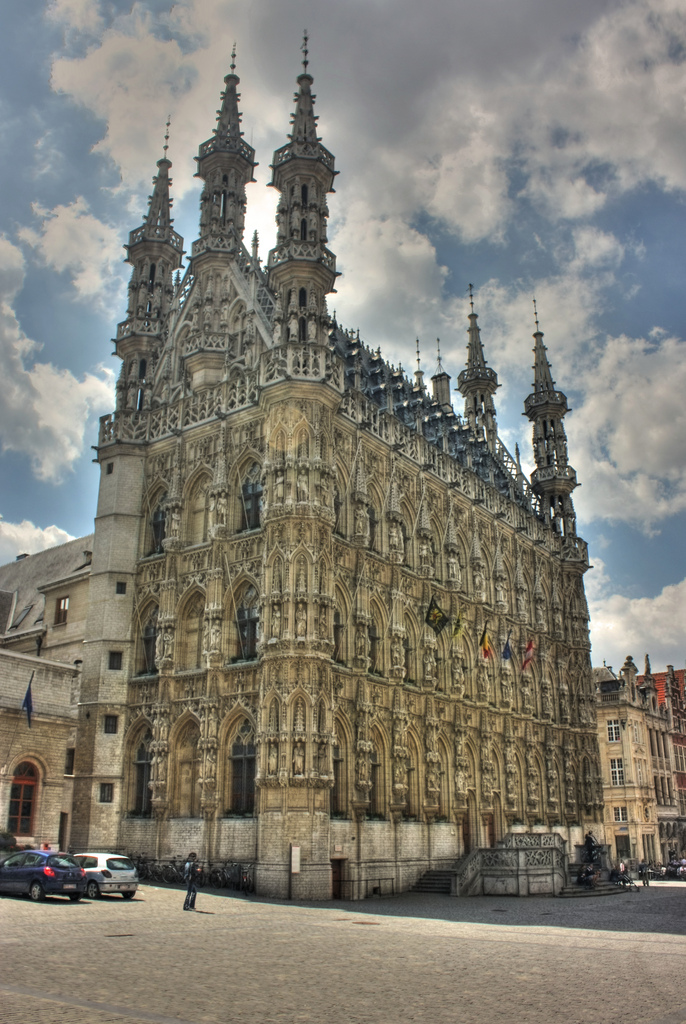 Het Stadhuis van Leuven